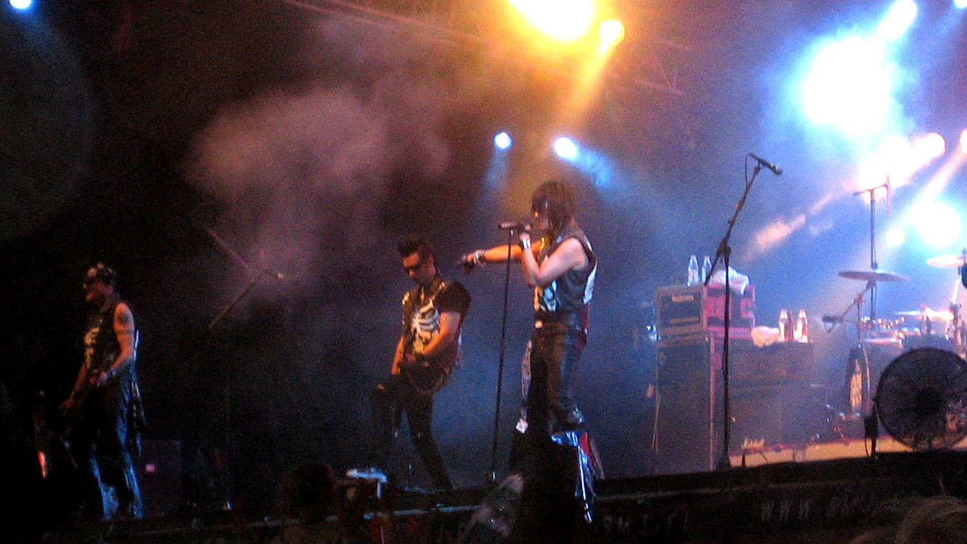 69 Eyes, Raumanmeren juhannus 2006, Finland.